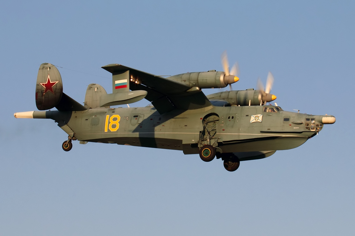 Russian Navy Beriev Be-12PS